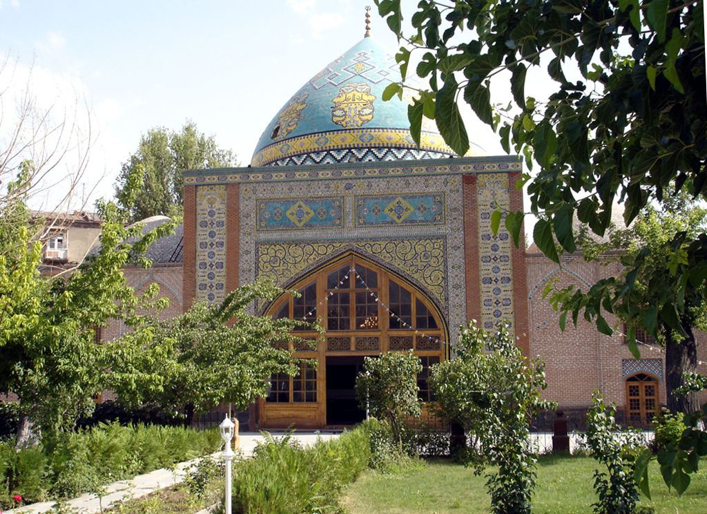 Erevan, la mosquée bleue 6/150